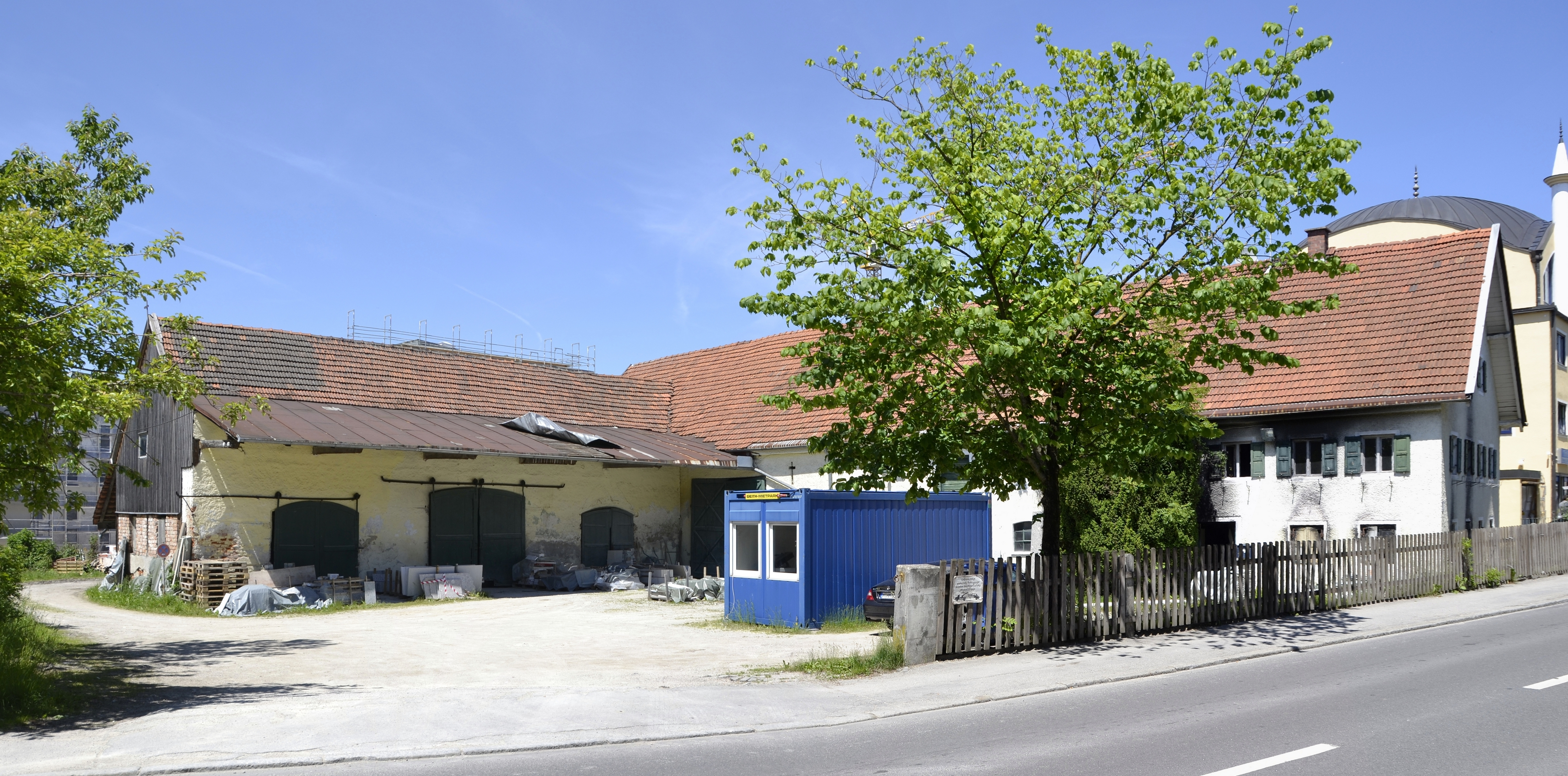 Planegger Straße 20; Zweiseitiger Bauernhof, Wohnhaus wohl 1. Hälfte 19. Jh.